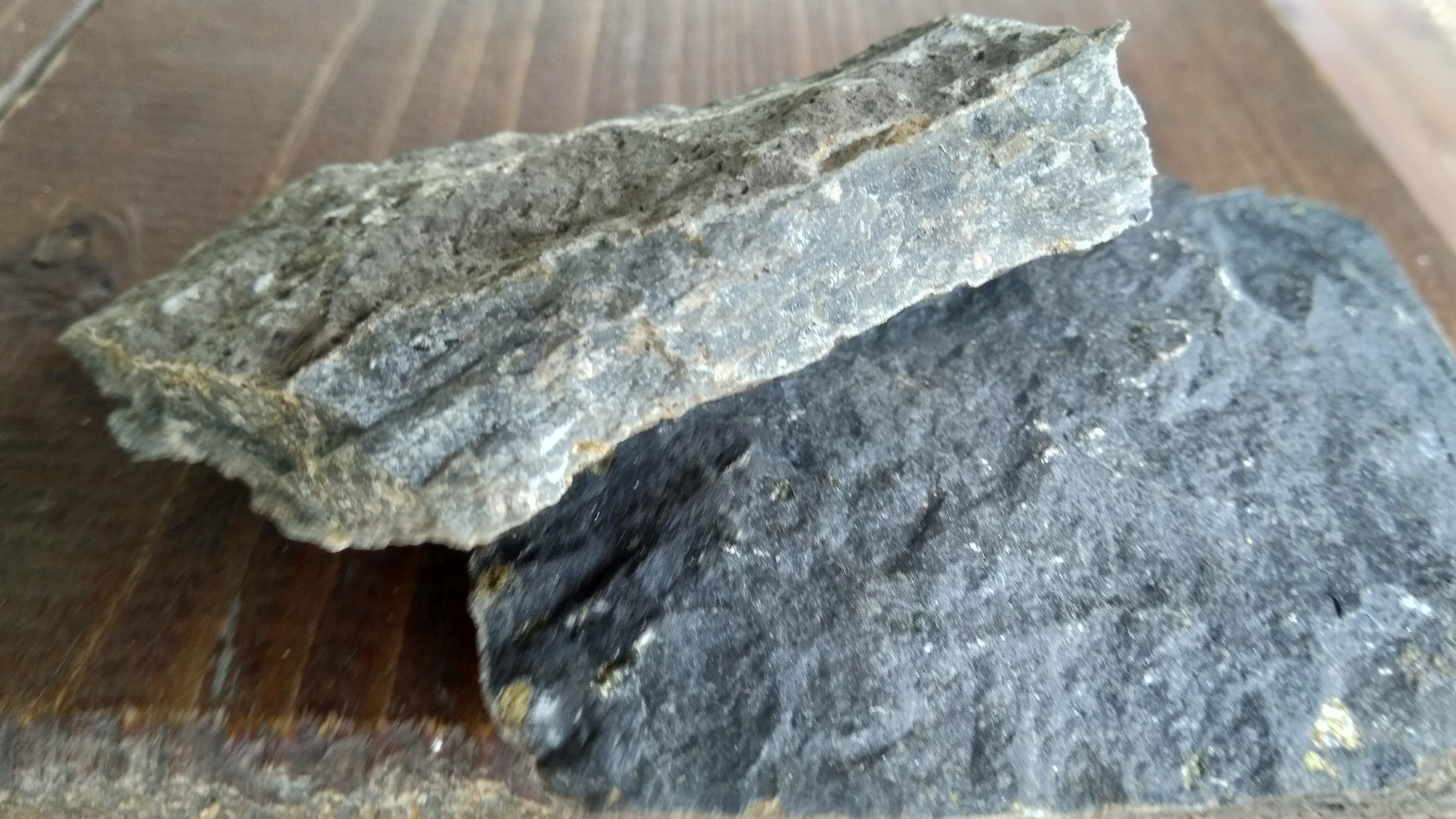 Vlevo nahoře trachyt, vpravo dole nefelinit